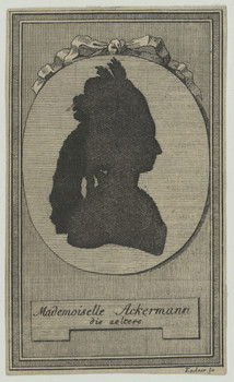 Silhouette der Schauspielerin Dorothea Caroline Ackermann (1752-1821).